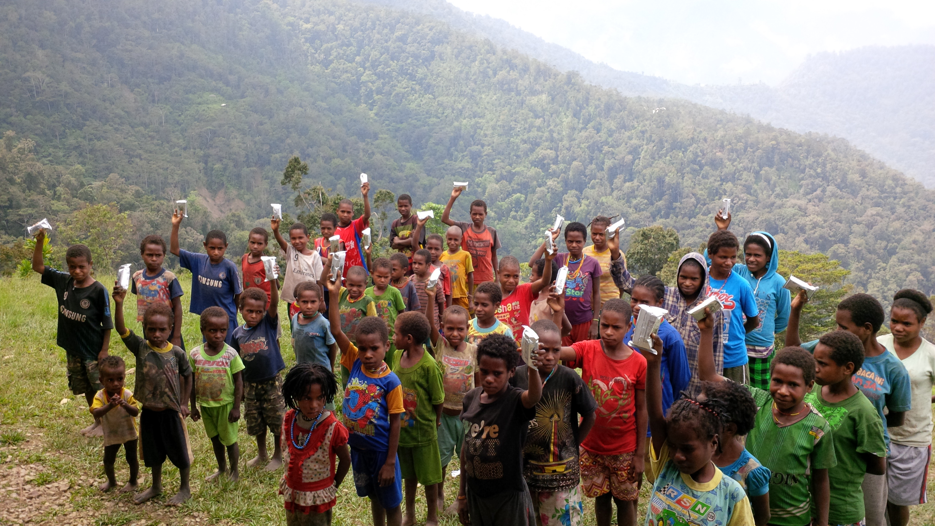 Sulitnya akses ke Distrik/ Kampung membuat warga kesulitan membawa bahan makanan dari kota